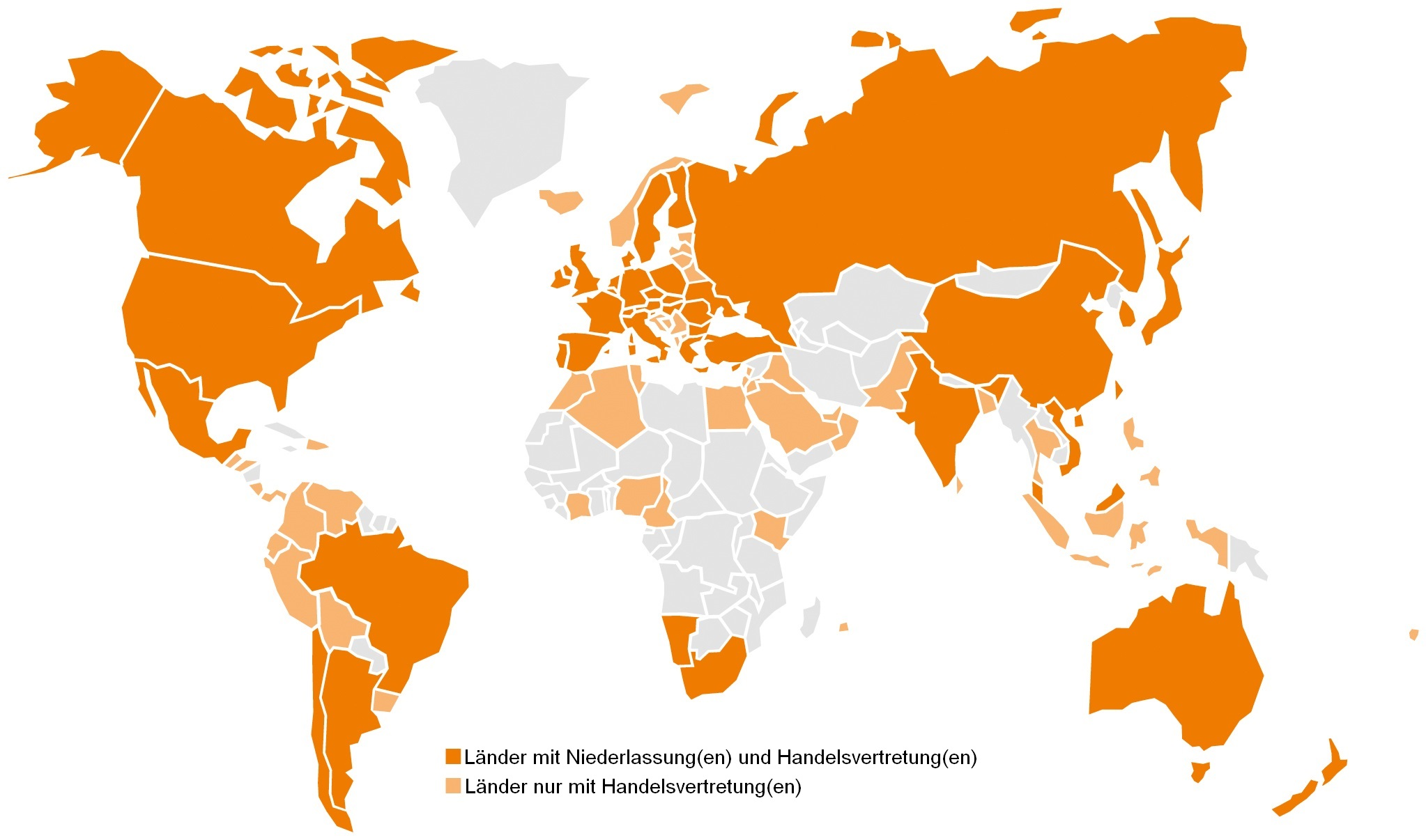 Niederlassungen und Handelsvertretungen der ifm-Unternehmensgruppe